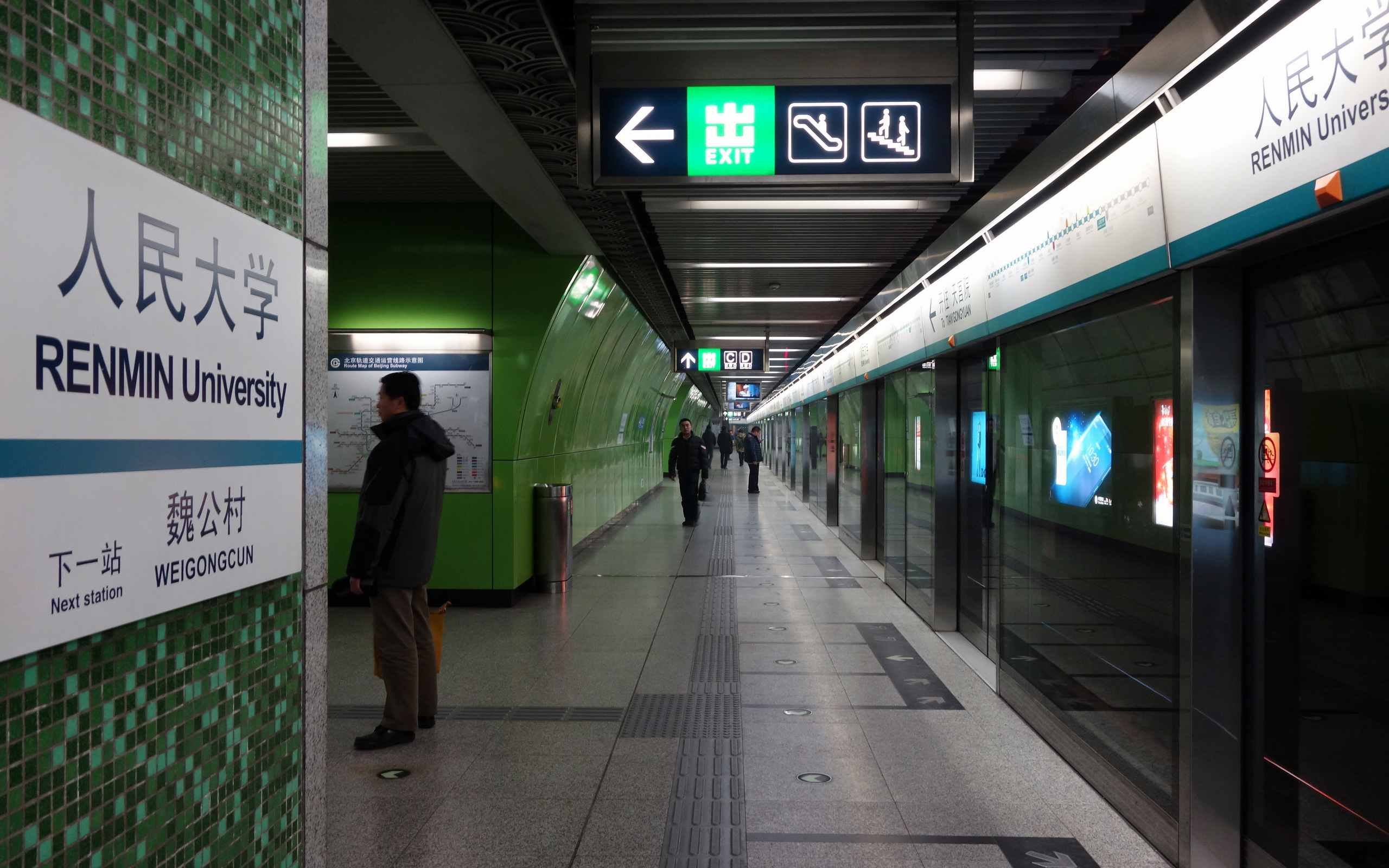 北京地铁4号线人民大学站分离式岛式站台